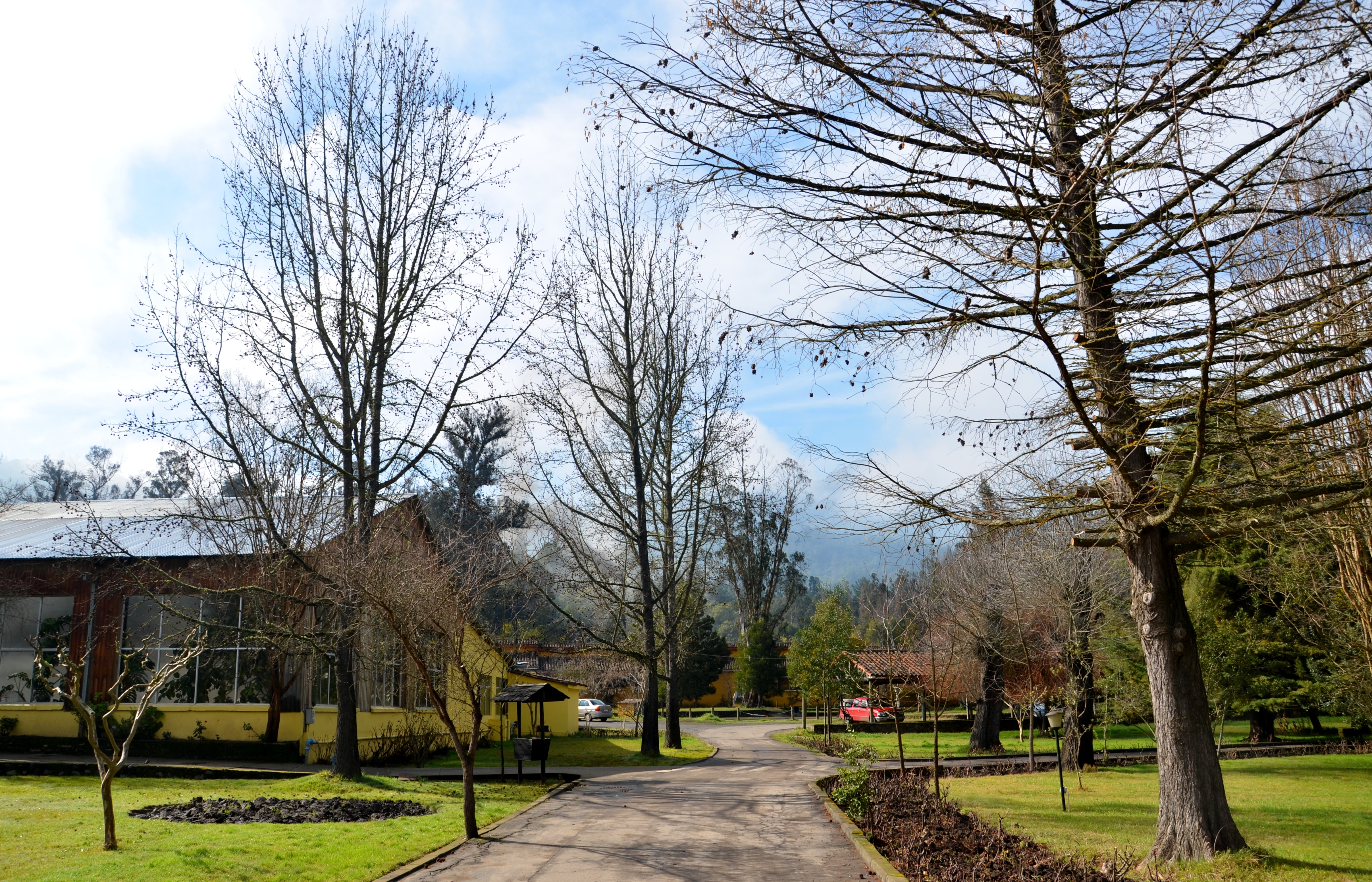 Ingreso a las Termas de Quinamávida, comuna de Colbún, Provincia de Linares, Región del Maule, Chile.